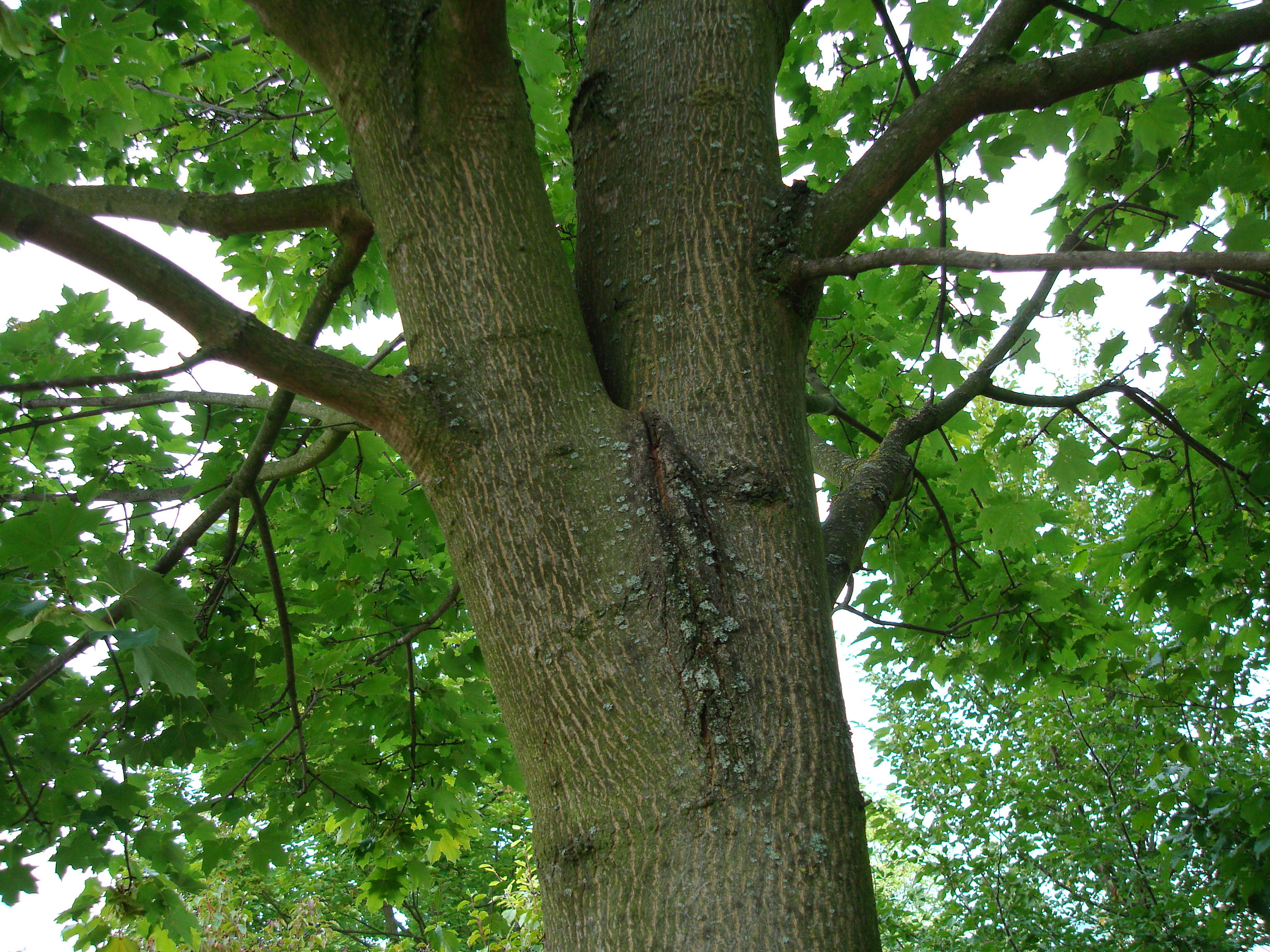 Druckzwiesel oder V-Zwiesel an einem Ahorn